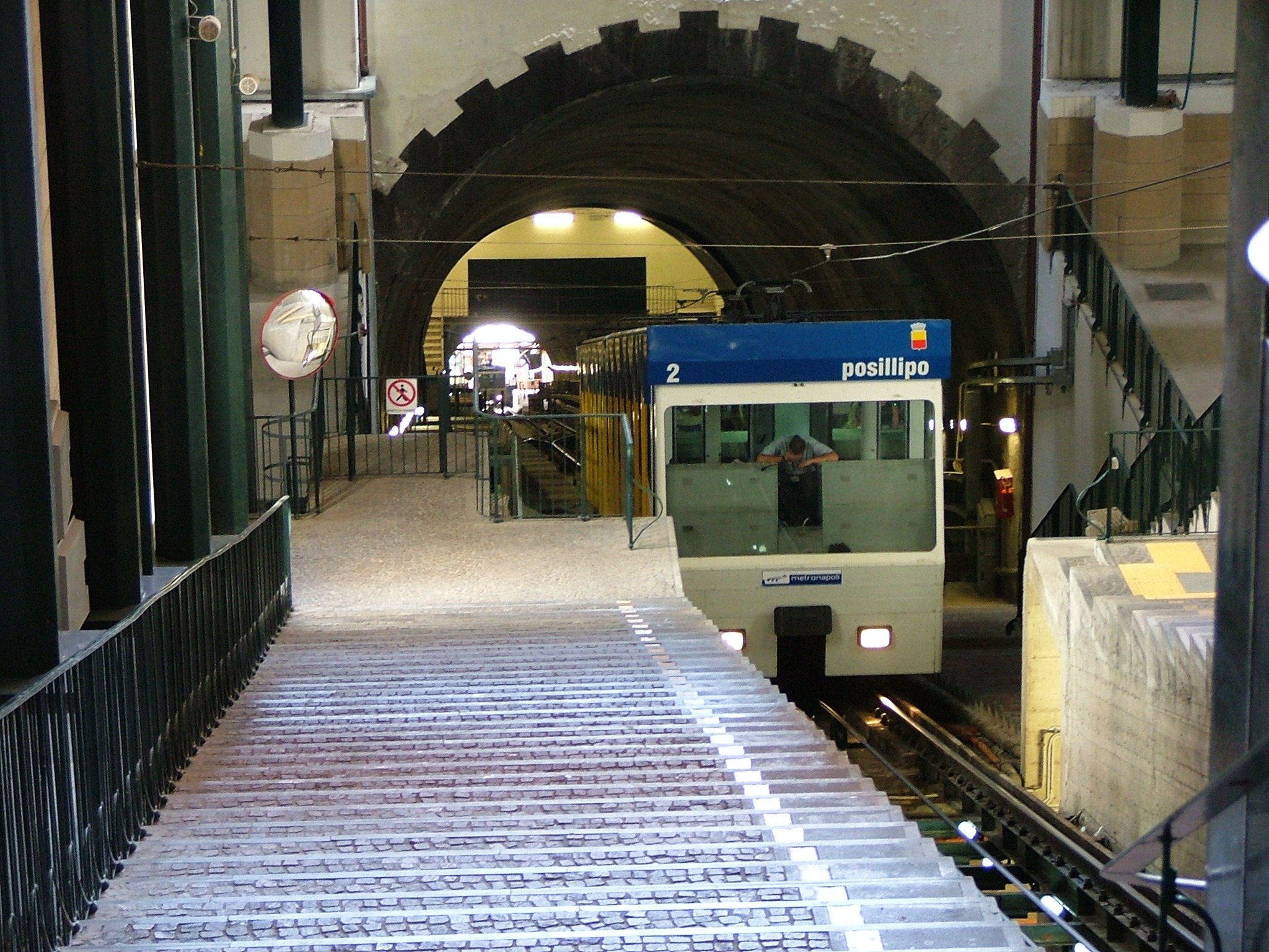 Funukular Mergellina w Neapolu.